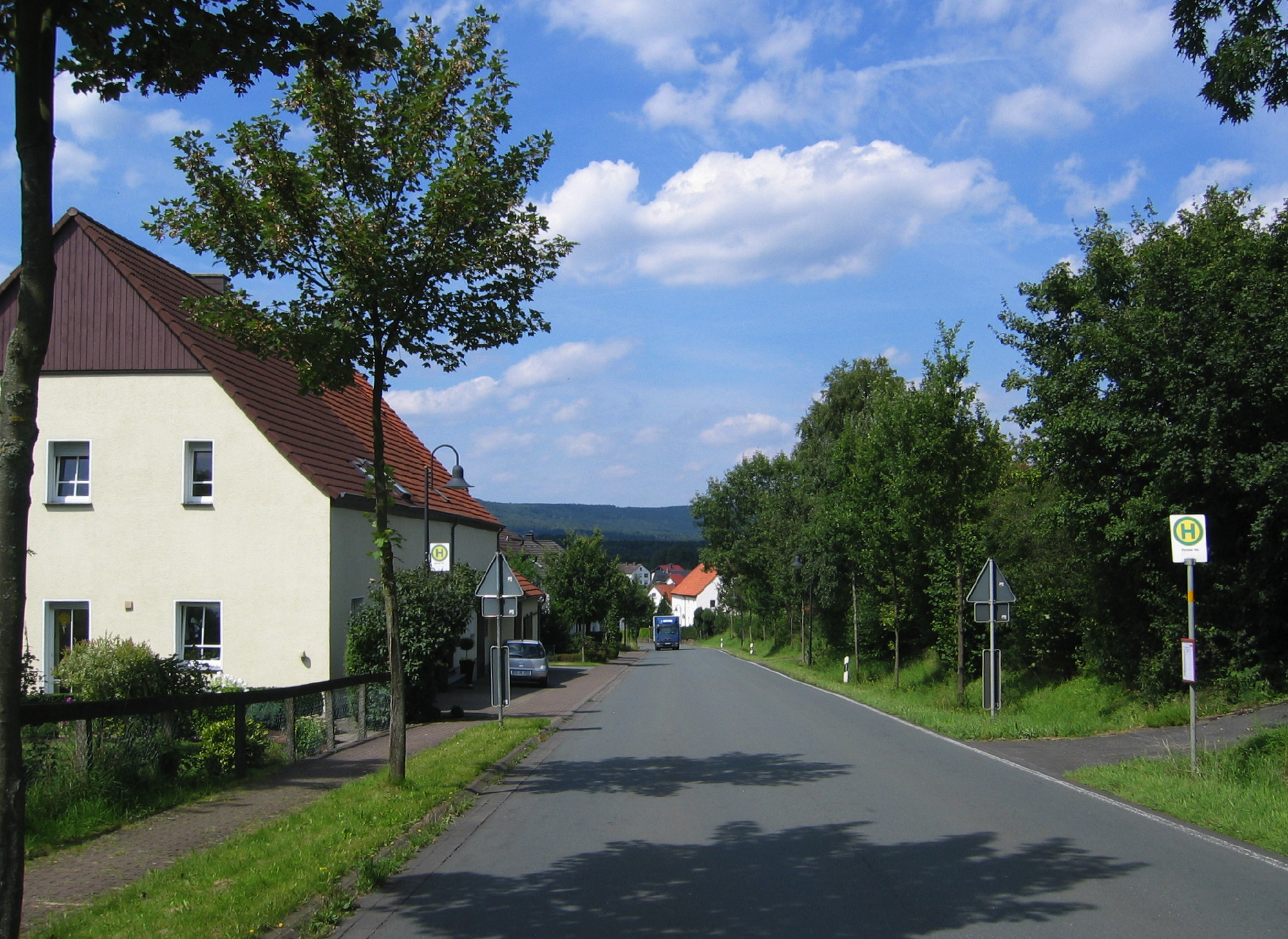 Ortseingang Langeland – Blick von Südosten entlang der Horner Straße in Richtung Langeland, Bad Driburg, Deutschland.